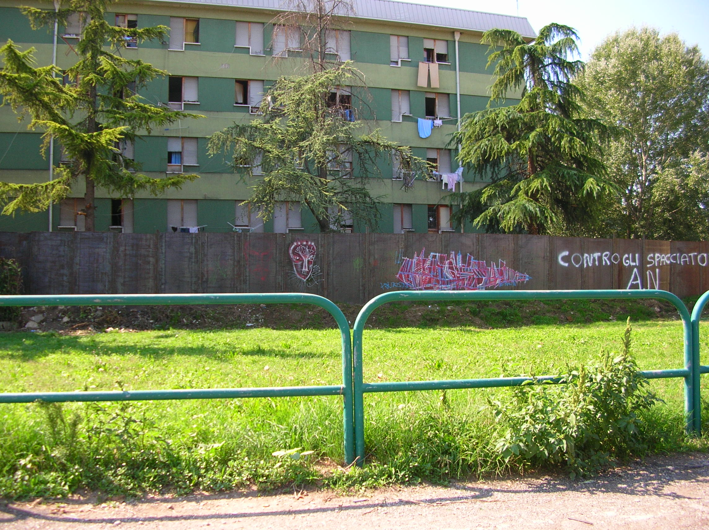 Il cosiddetto 'muro' di Via Anelli a Padova. Immagine scattata da Massimo Previato in via De' Besi.